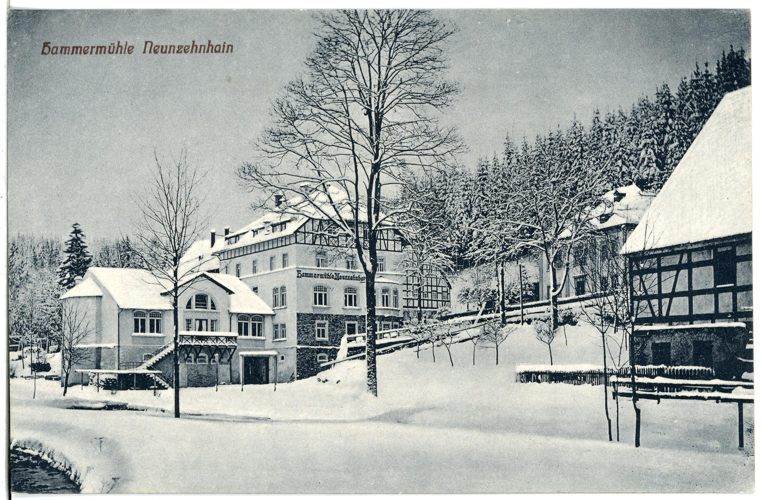 Neunzehnhain; Hammermühle im Winter This postcard is from publisher Brück & Sohn in Meißen ( postcard has a unique number 21422 and is available in a higher resolution at the publisher. This images was uploaded in a cooperation project between Wikipedians and the publisher.